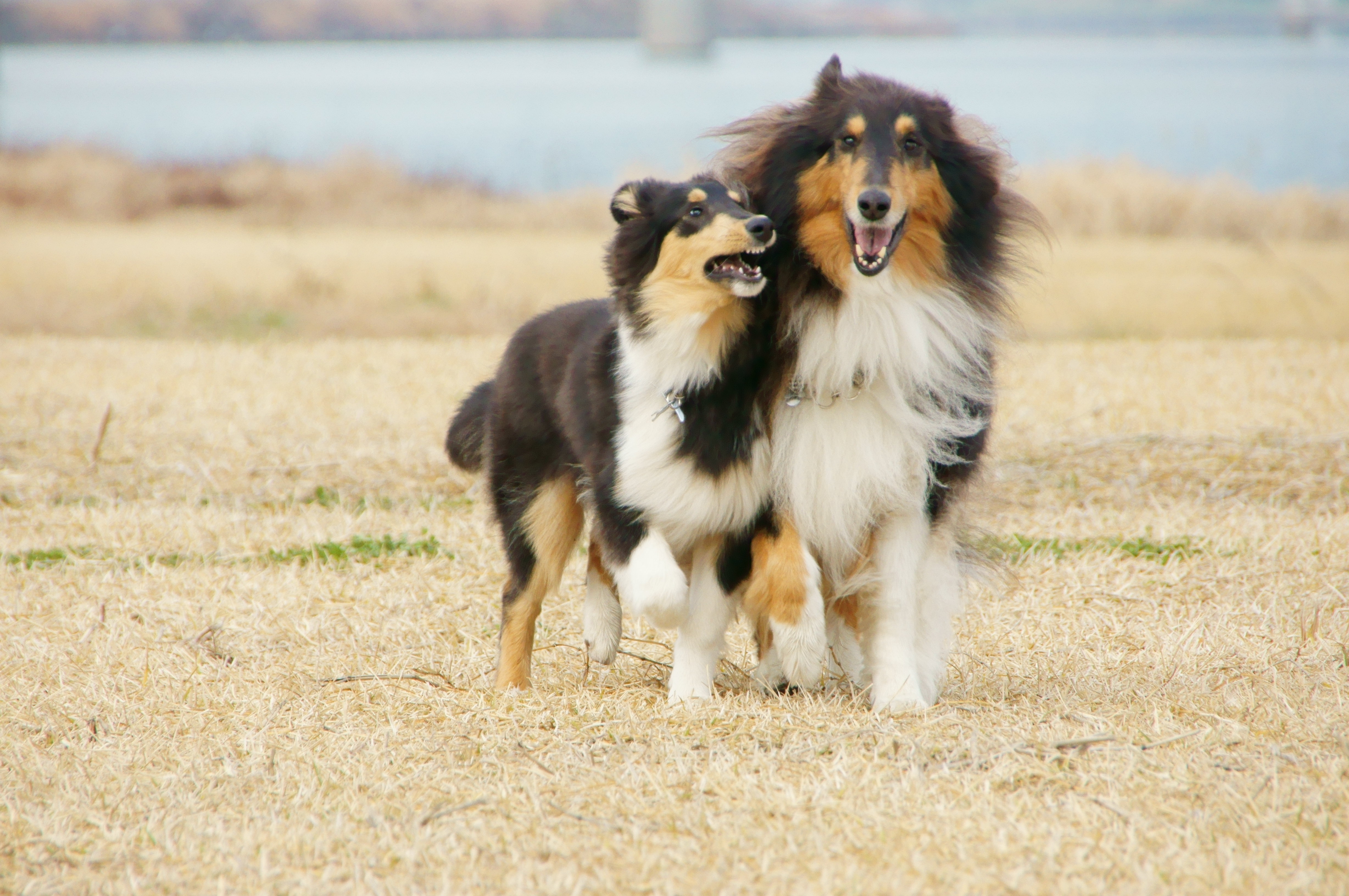 ラフ・コリーのパピーとアダルト